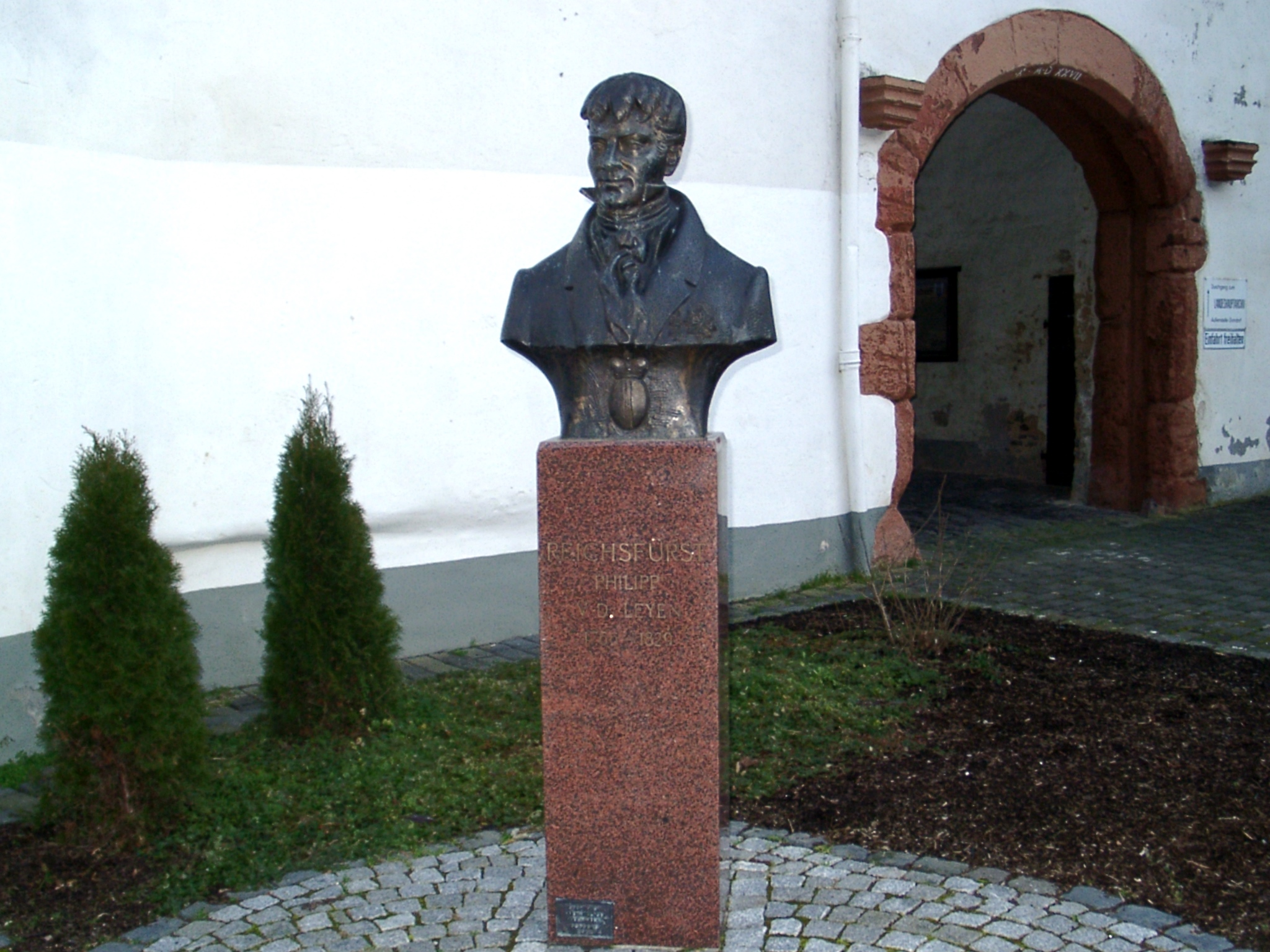 Büste Philipp von der Leyen vor Schloss Gondorf, bezeichnet Karol Badyna [20]01 - selbst fotografiert 5.2.2005 - Lizenz: CC-BY